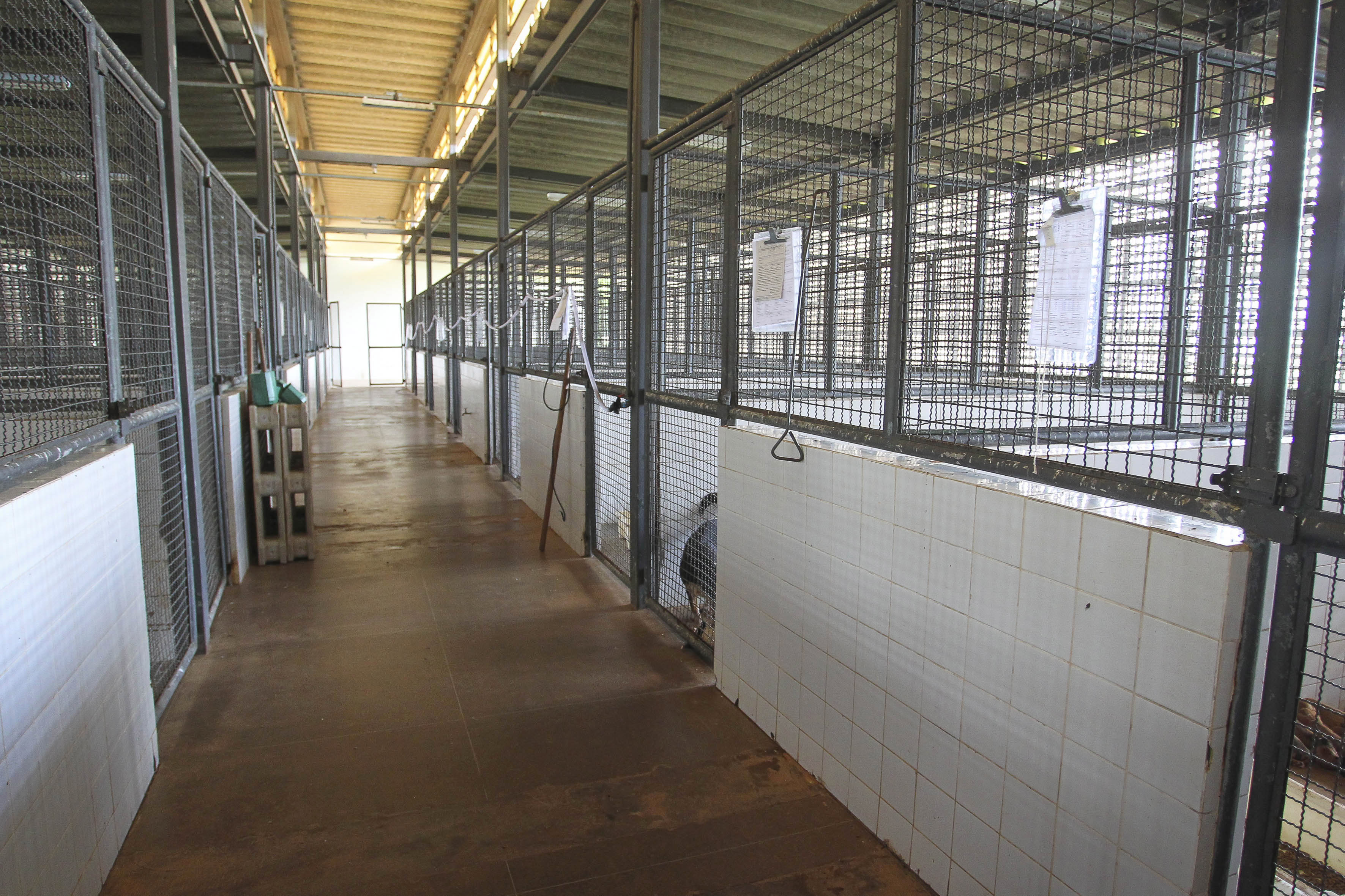 Brasília, DF, Brasil, 11/3/2015 Foto: Andre Borges/Agência Brasília